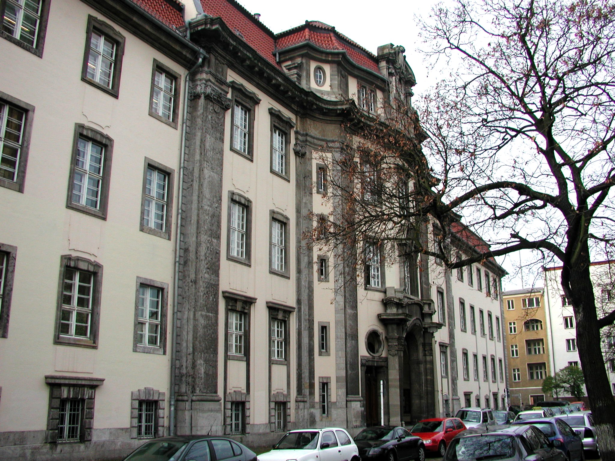 Amtsgericht am Roedeliusplatz